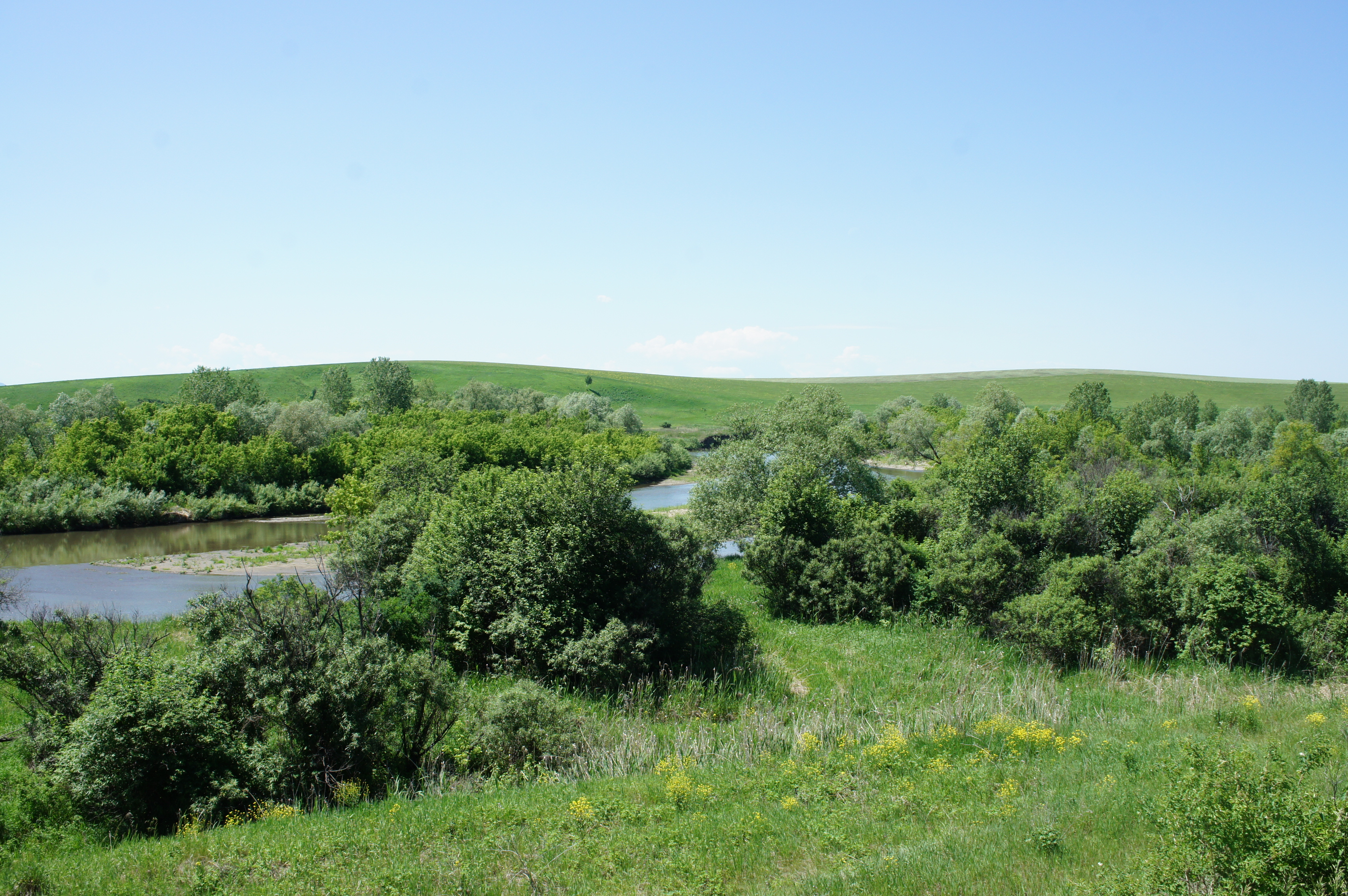 река Песчанная в Смоленском районе Алтайского края, окрестности с. Точильное